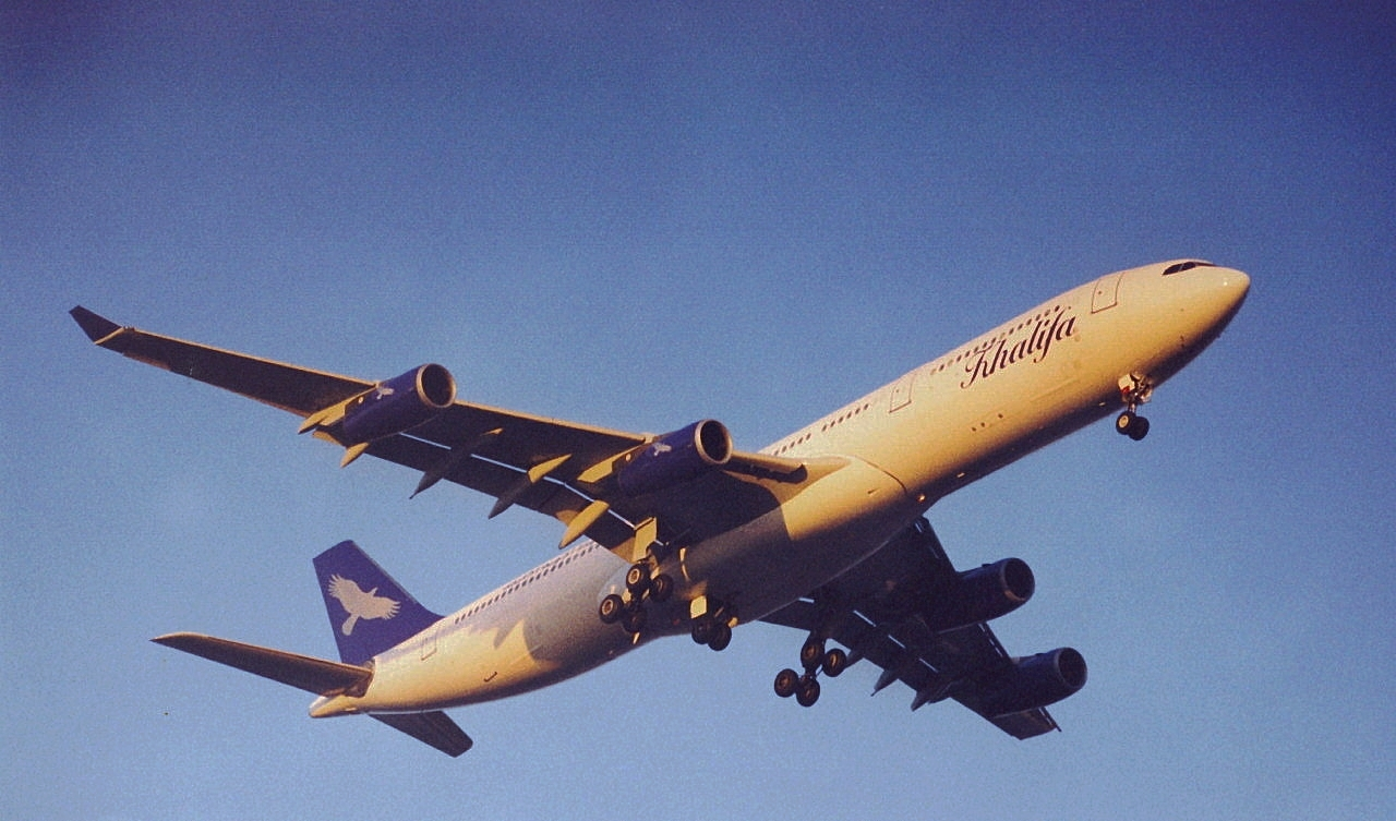 Khalifa A340-313X